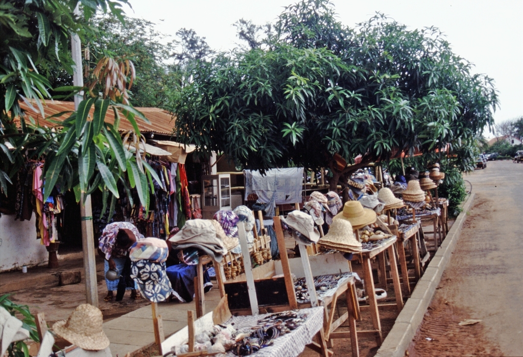 Souvenirstände an der Touristenmeile in Bakau, in der Mitte ein Mango-Baum